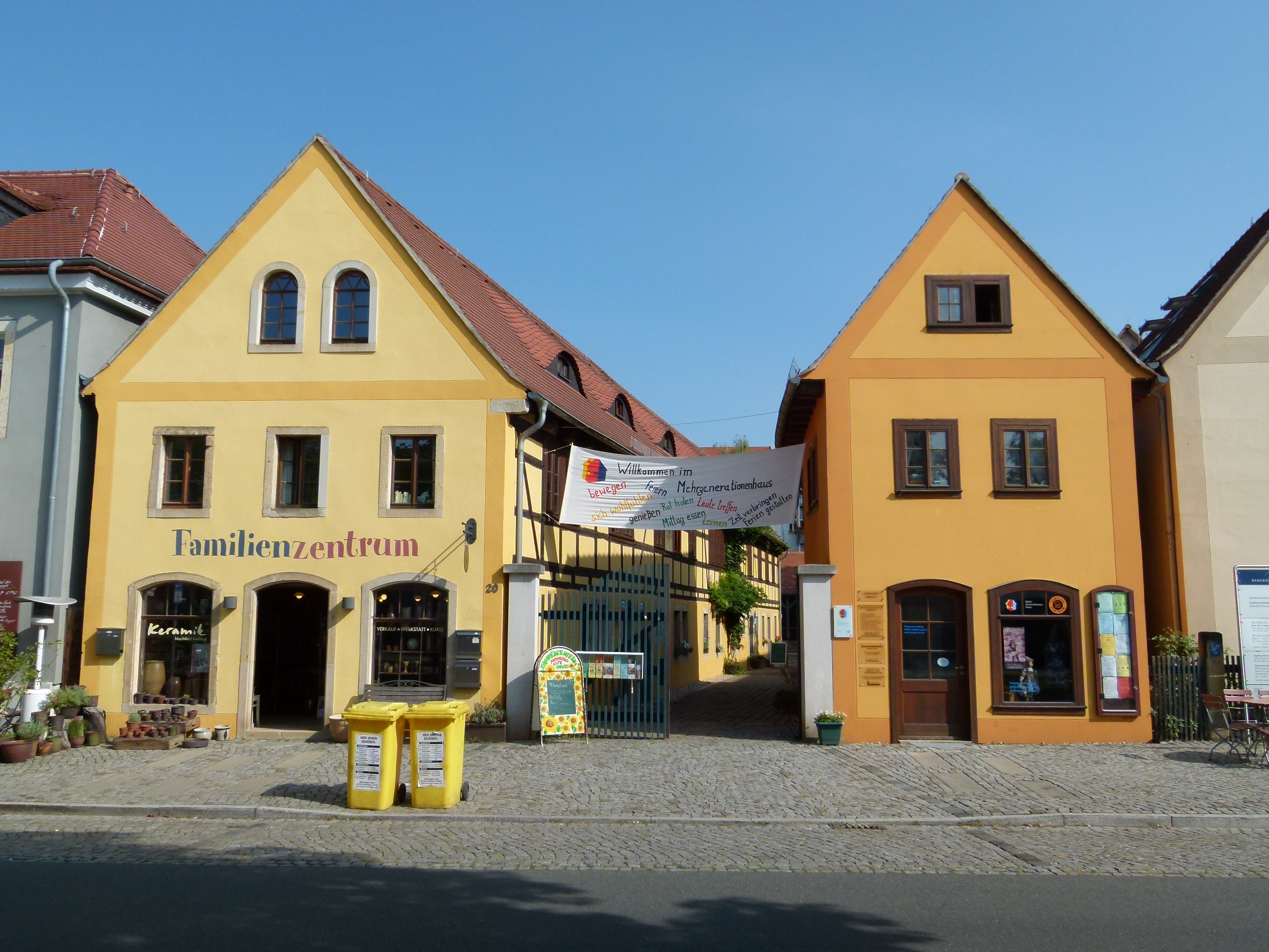 Denkmalgeschütztes Haus, Altkötzschenbroda 20, Radebeul, Sachsen